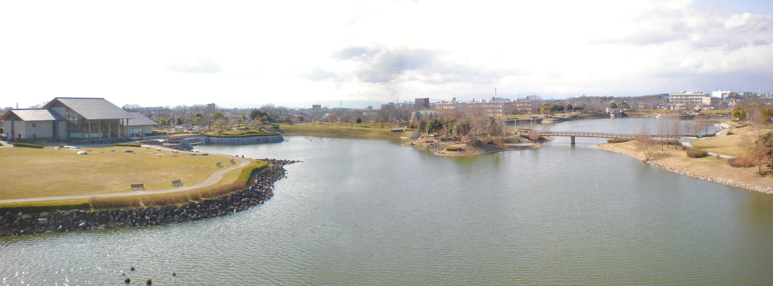 愛知県春日井市にある落合公園（撮影場所：水の塔）のパノラマ写真（ソフトウェアにて合成）